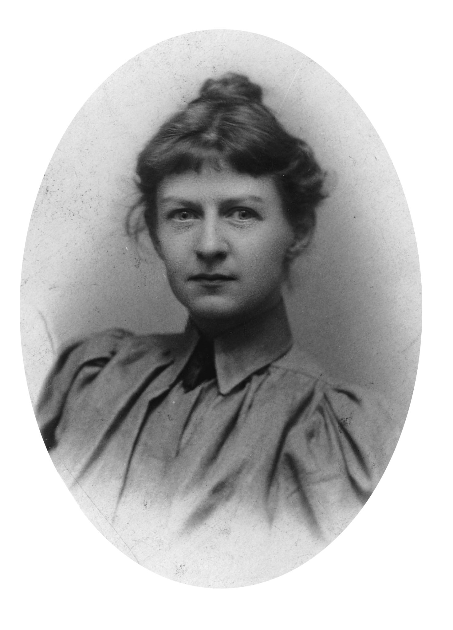 Pauline Dohn (Rudloph)